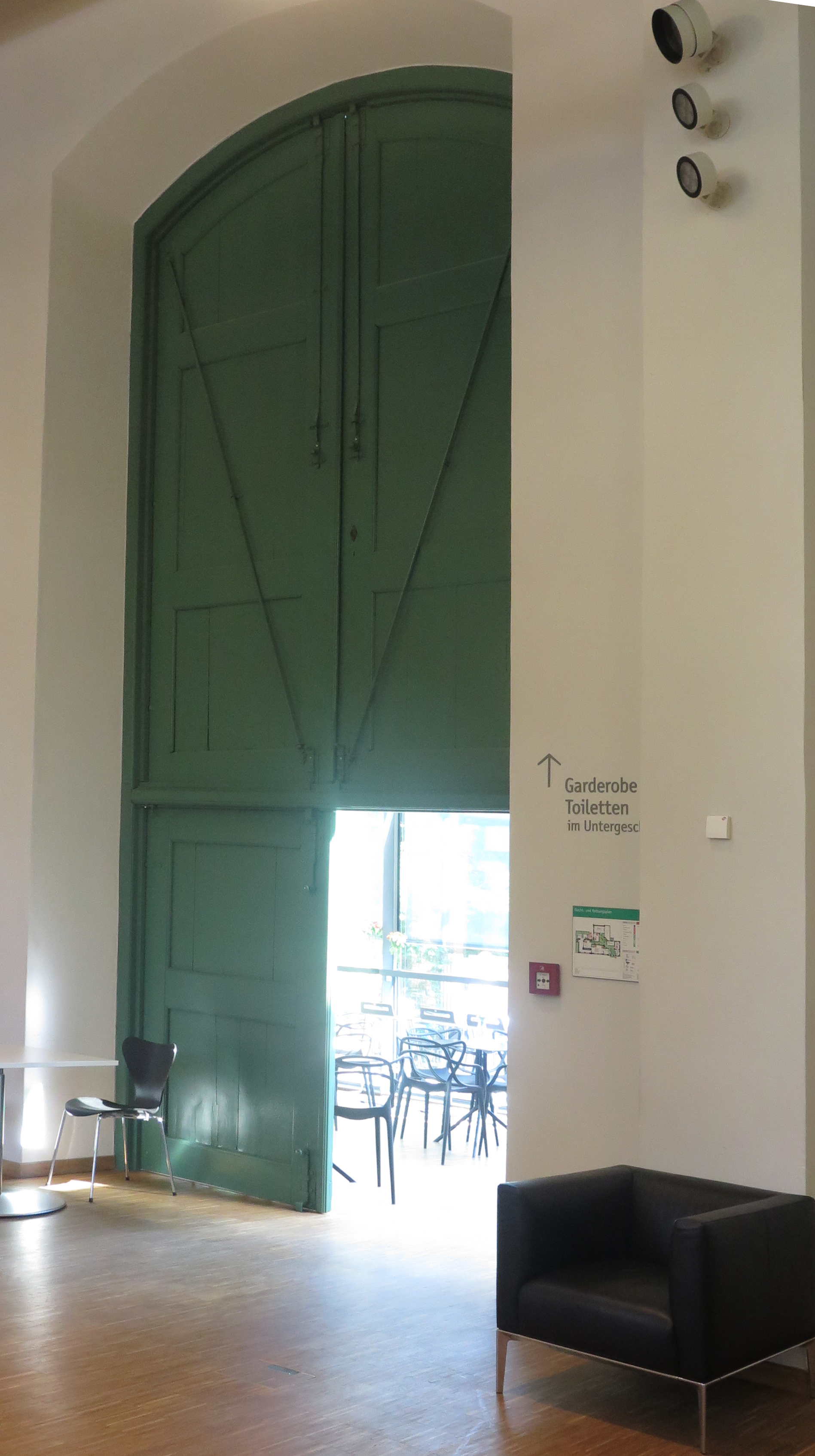 Tor im Grossen Atelier im Hildebrandt-Haus - Heute Durchblick in das Cafe